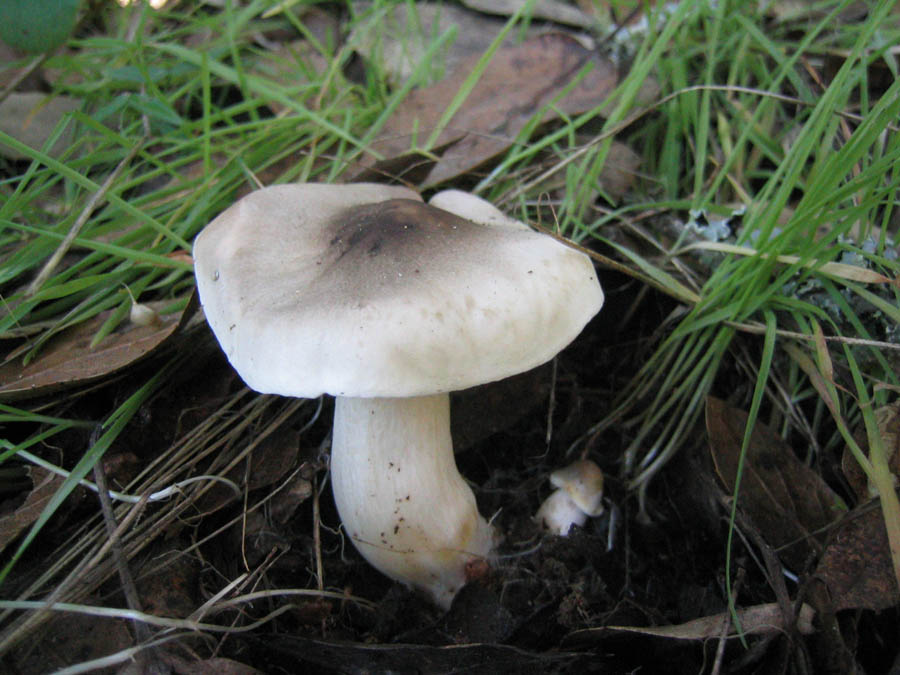 Tricholoma pardinum